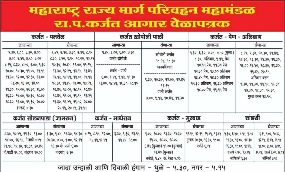 कर्जत वेळापत्रक